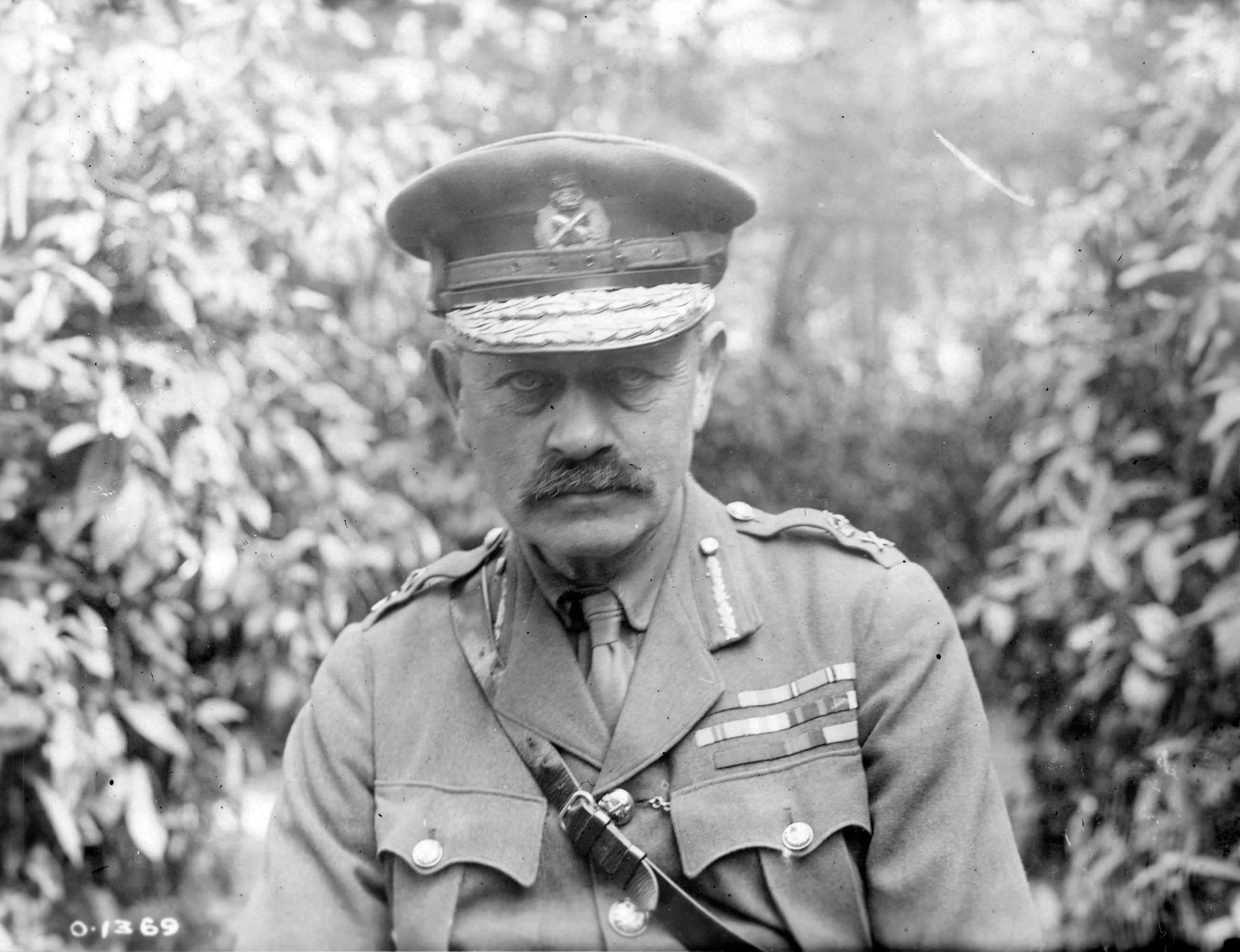 Julian Byng en avril 1917.